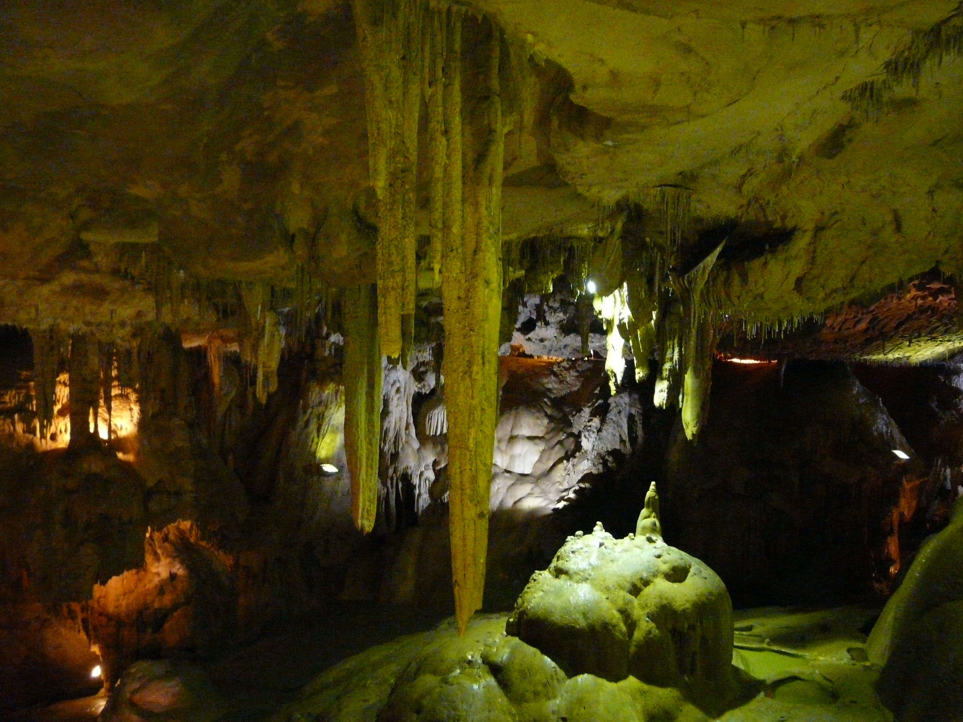 L'intérieur des grottes de Bétharram.